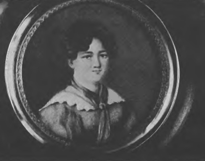 Elisabeth Collard